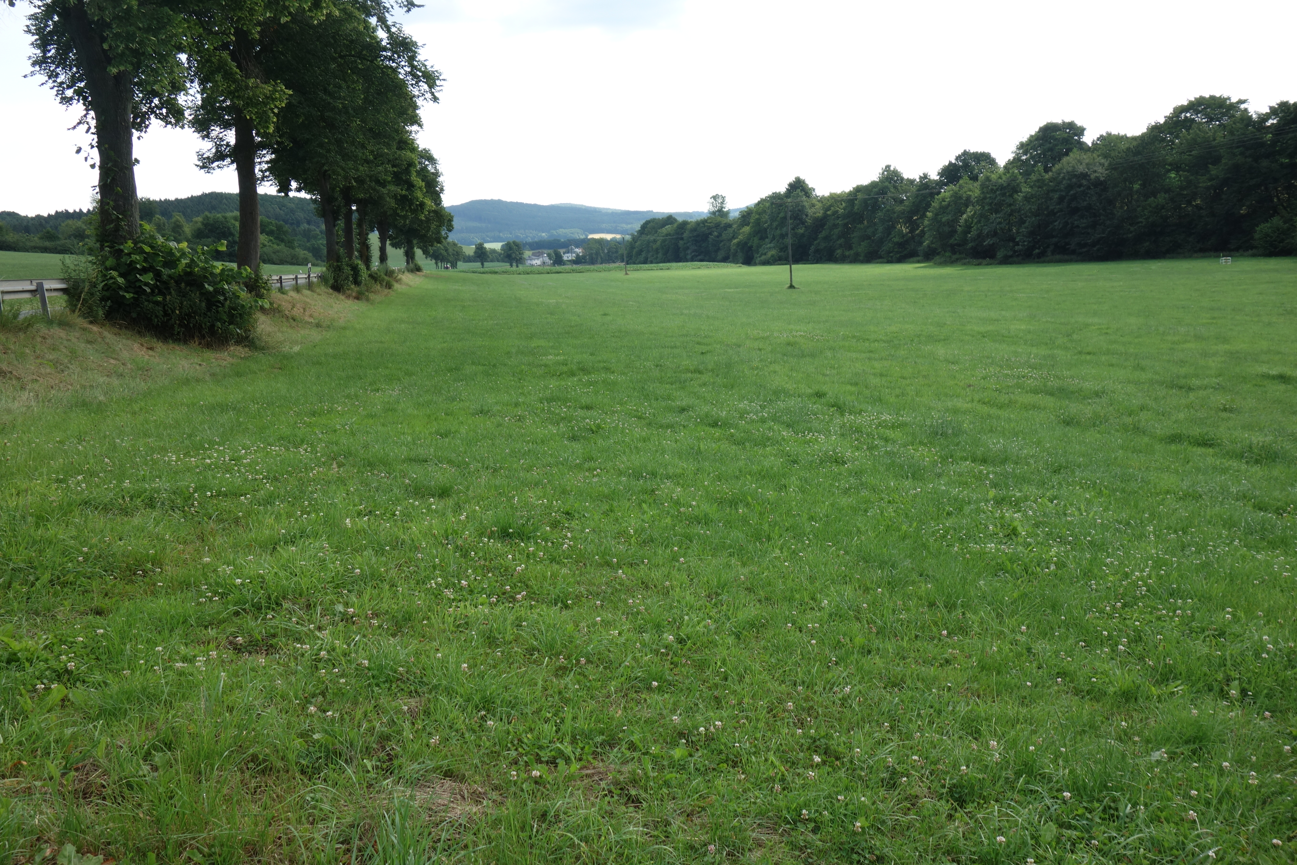 Landschaftsschutzgebiet Talraum des Kesselbaches vom Straßenrand östlich Frenkhausen (Meschede).